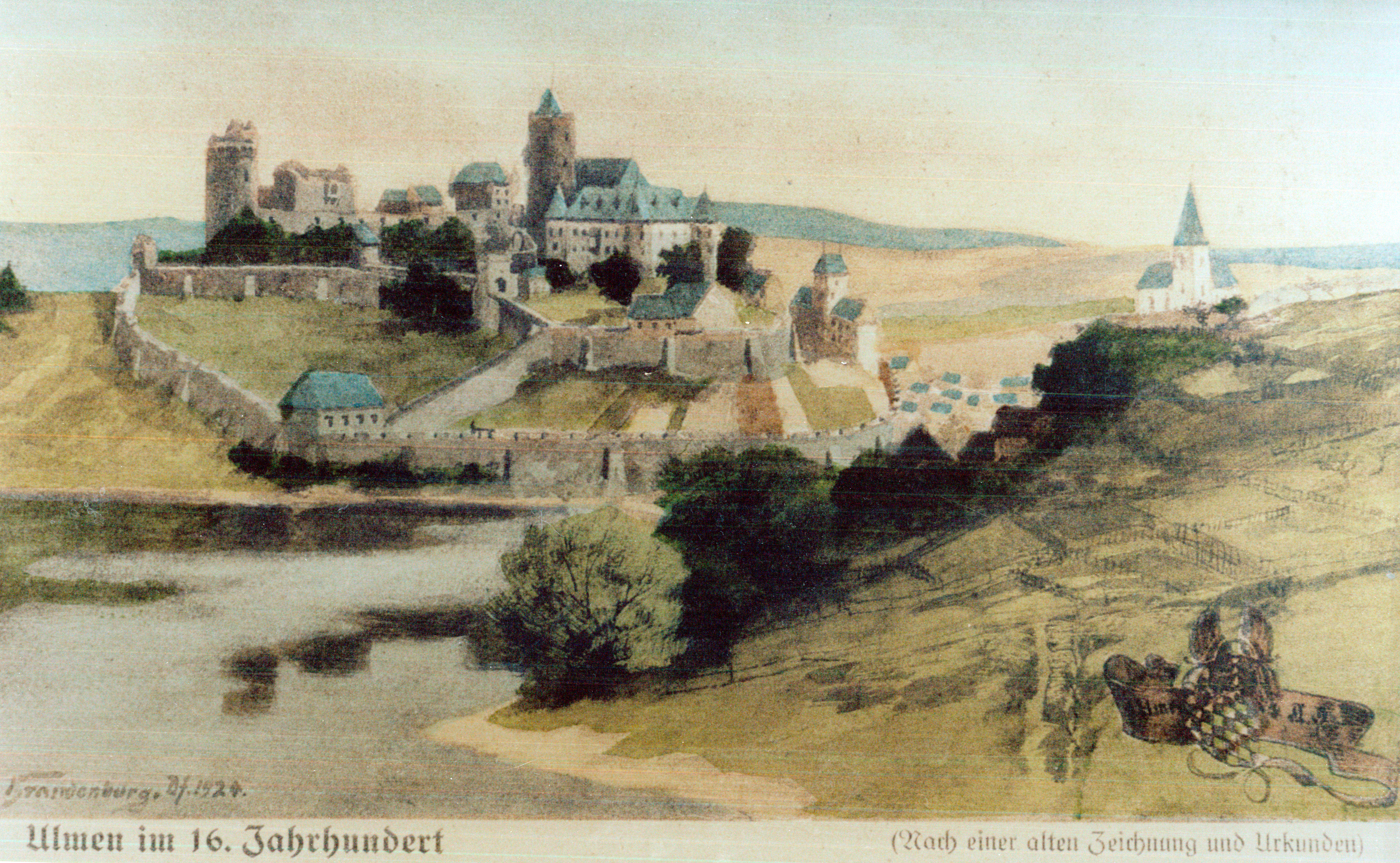 Burg-Ulmen